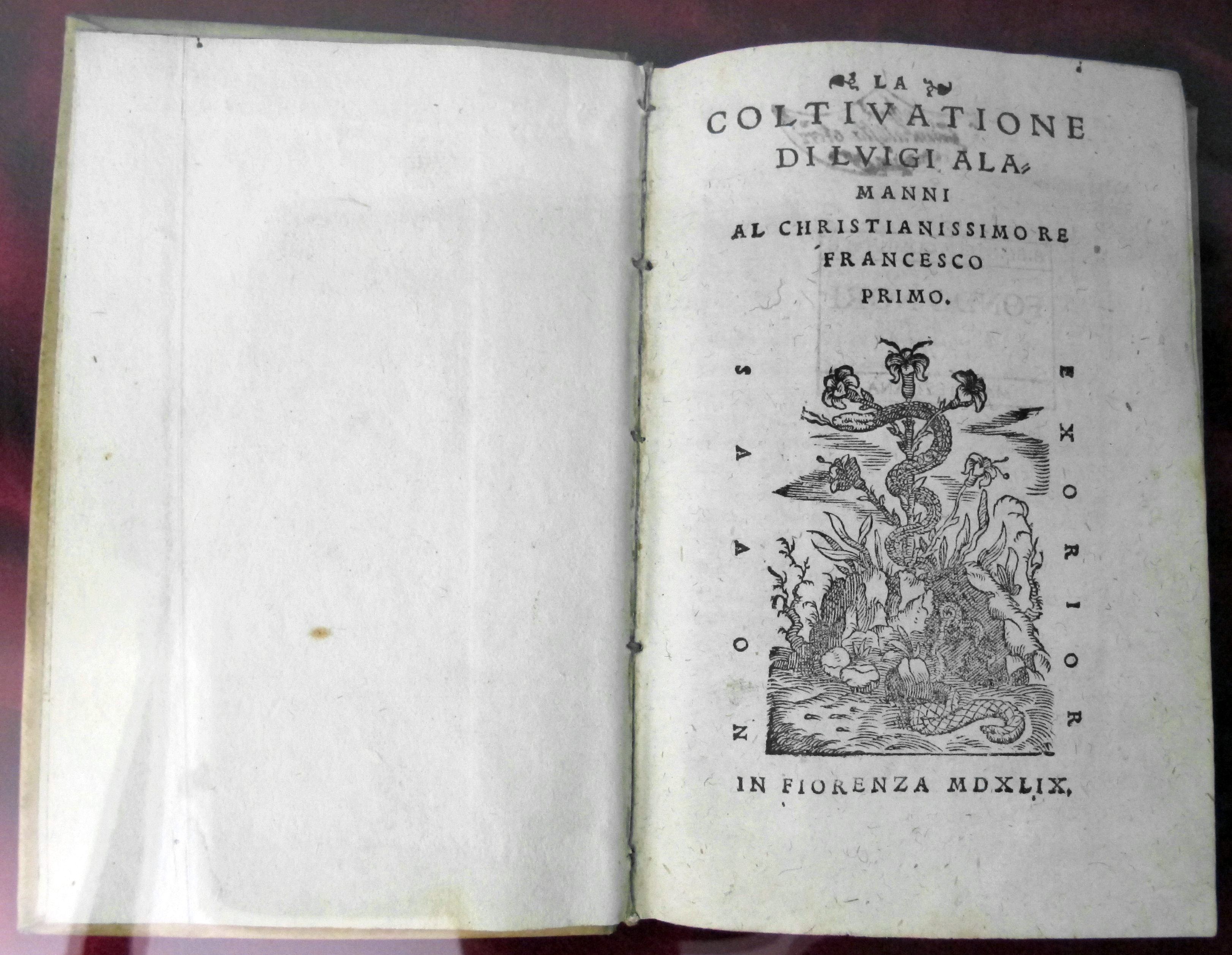 Biblioteca Malatestiana - MIBAC This is a photo of a monument which is part of cultural heritage of Italy.